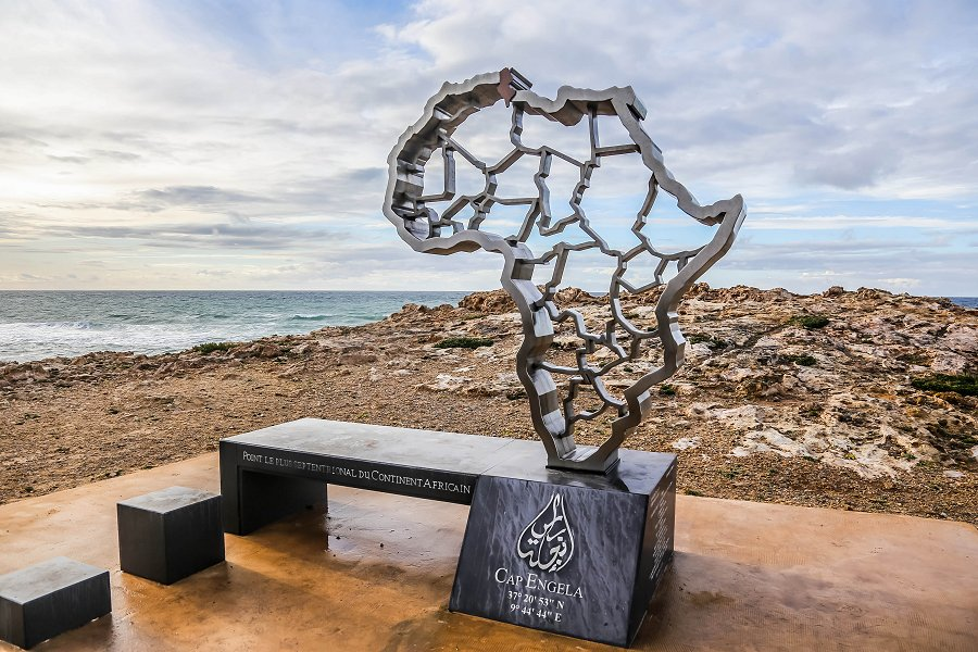 Le cap Angela (arabe : رأس أنجلة) ou Ras Ennghela, est un cap de la mer Méditerranée, situé dans le gouvernorat de Bizerte (délégation de Bizerte Nord) en Tunisie. Il est désigné depuis 2014 comme le point le plus septentrional d'Afrique nord